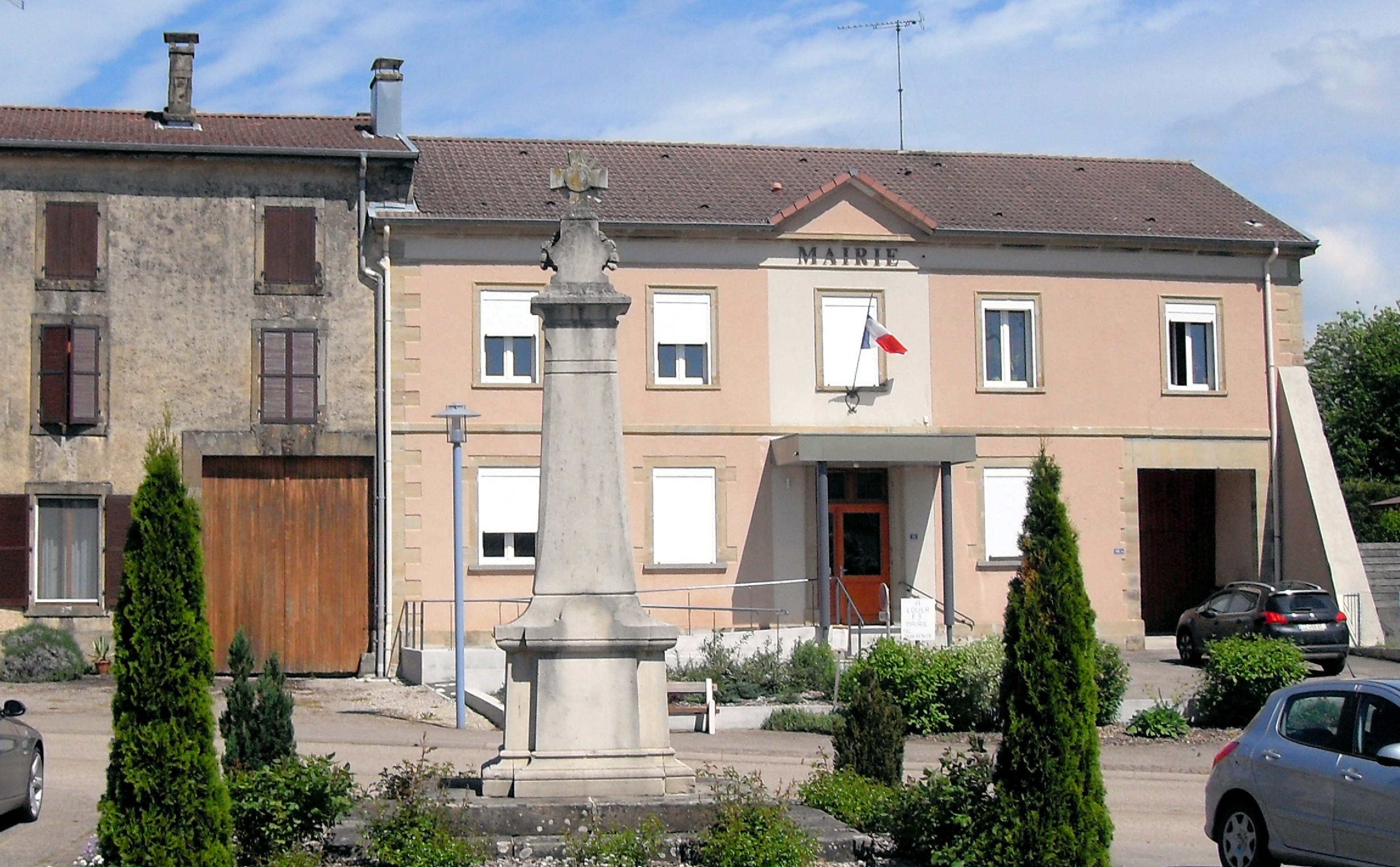 La mairie d'Haillainville